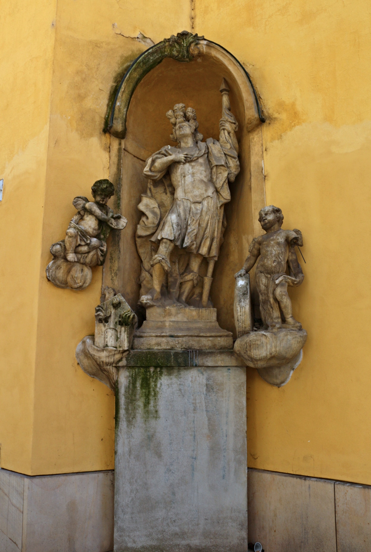 Kostel sv. Máří Magdaleny v Brně